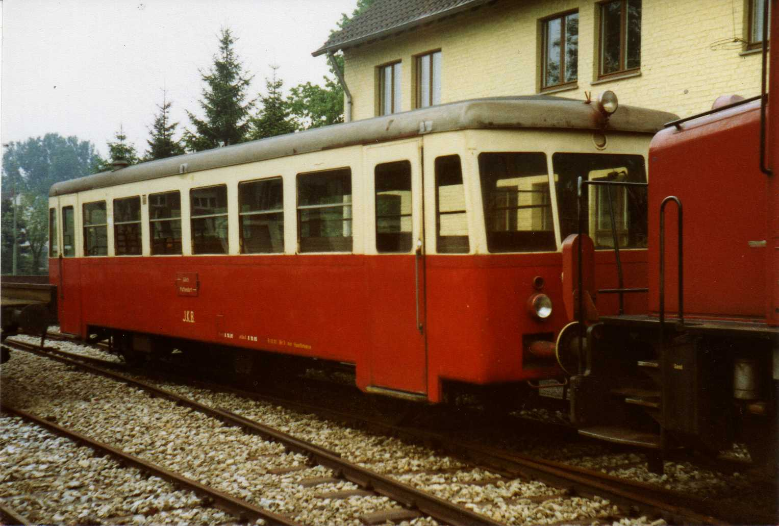 Am frühen Abend des 17. Mai 1982 verkehrte der JKB-T 1 als motorloser Beiwagen im Schlepp der JKB-Diesellok V 35 als Sonderfahrt auf der JKB-Strecke, hier noch vorm Einstieg der Gruppe im ehemaligen JKB-Bahnhof Jülich Nord in der Adolf-Fischer-Straße (gelbes Gebäude im Hintergrund, nicht zu verwechseln mit dem 2002 eingerichteten Rurtalbahn-Haltepunkt Jülich Nord im Jülicher Nordviertel)